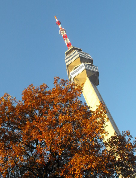 Avalski toranj viđen iz podnožja.